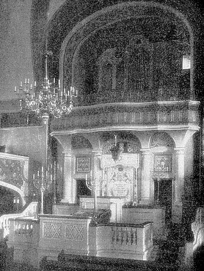 Nowa Synagoga w Lesznie